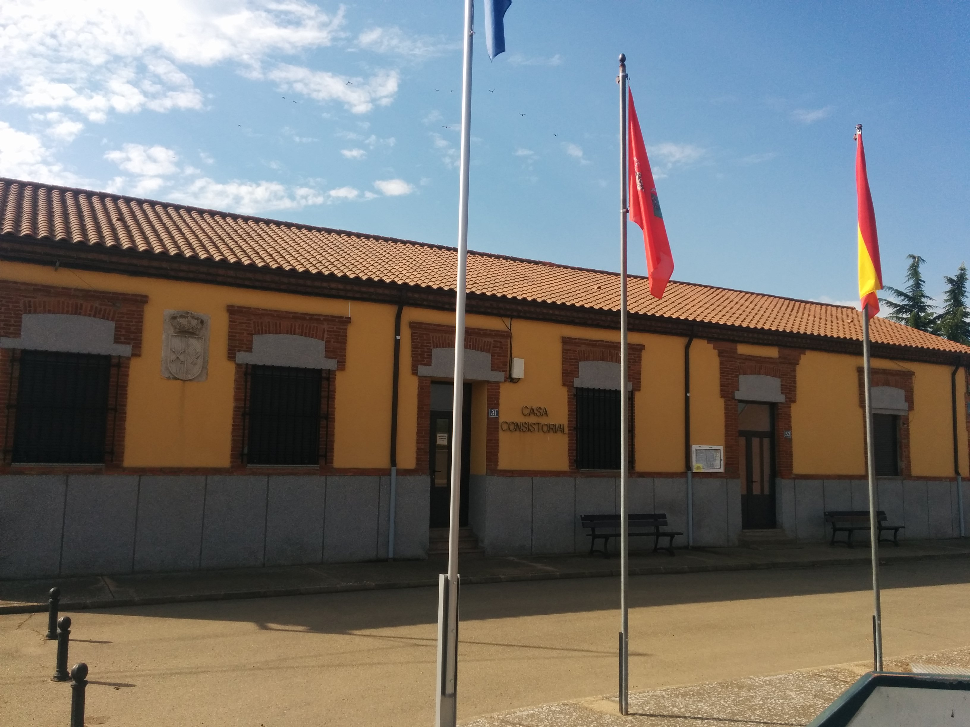 Ayuntamiento de San Pedro Bercianos, provincia de León.